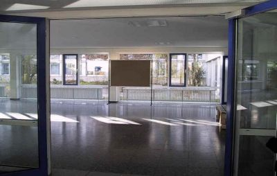 Hauptschule an der Wiesentfelder Straße (General School at the Wiesenfelder Street): Entrance Hall